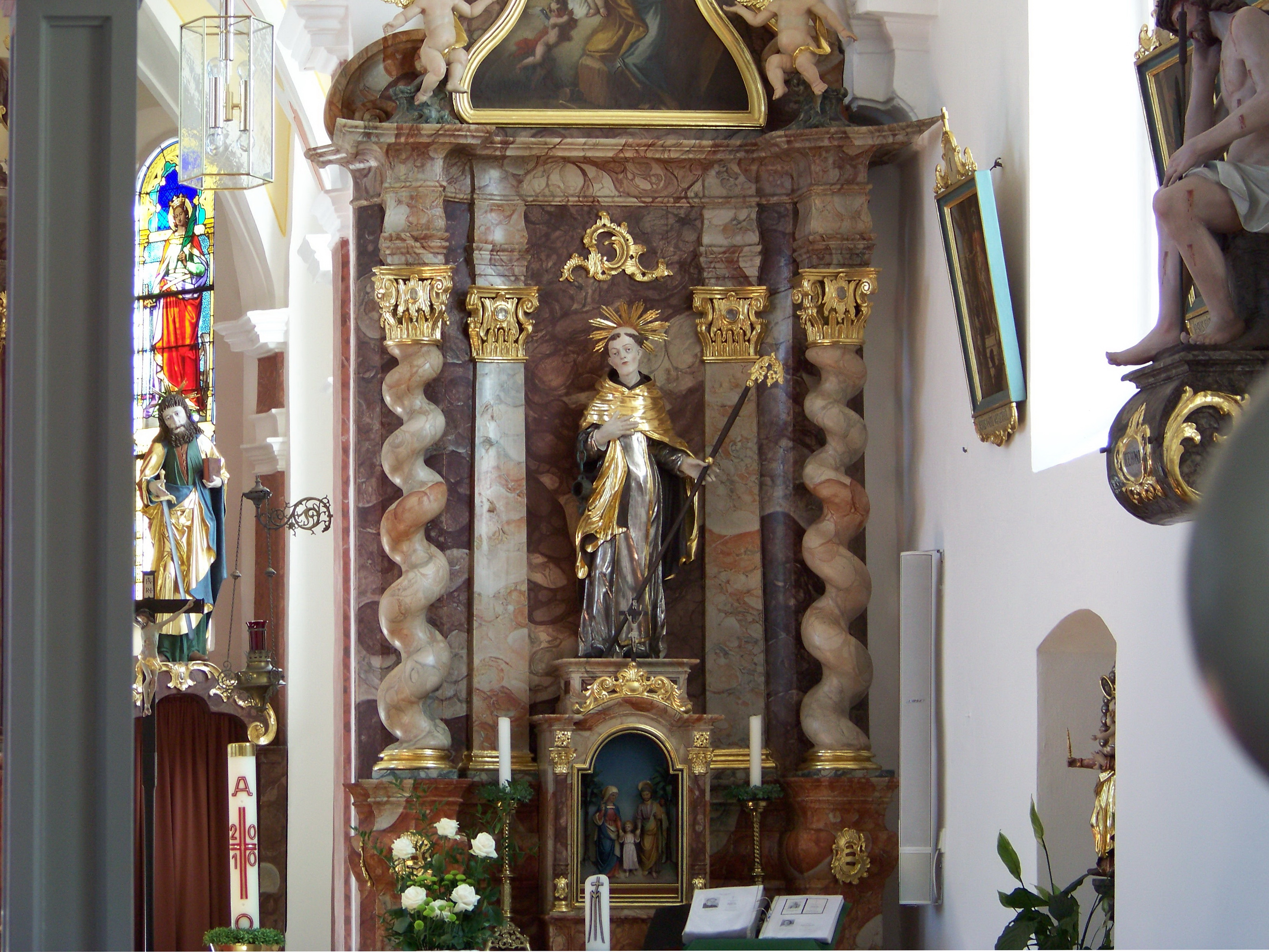 Hohenthann, Schmatzhausen. Kirche St. Katharina. Der Seitenaltar St. Leonhard mit zwei Pilastern und zwei gewundenen Säulen wurde um 1770 geschaffen.